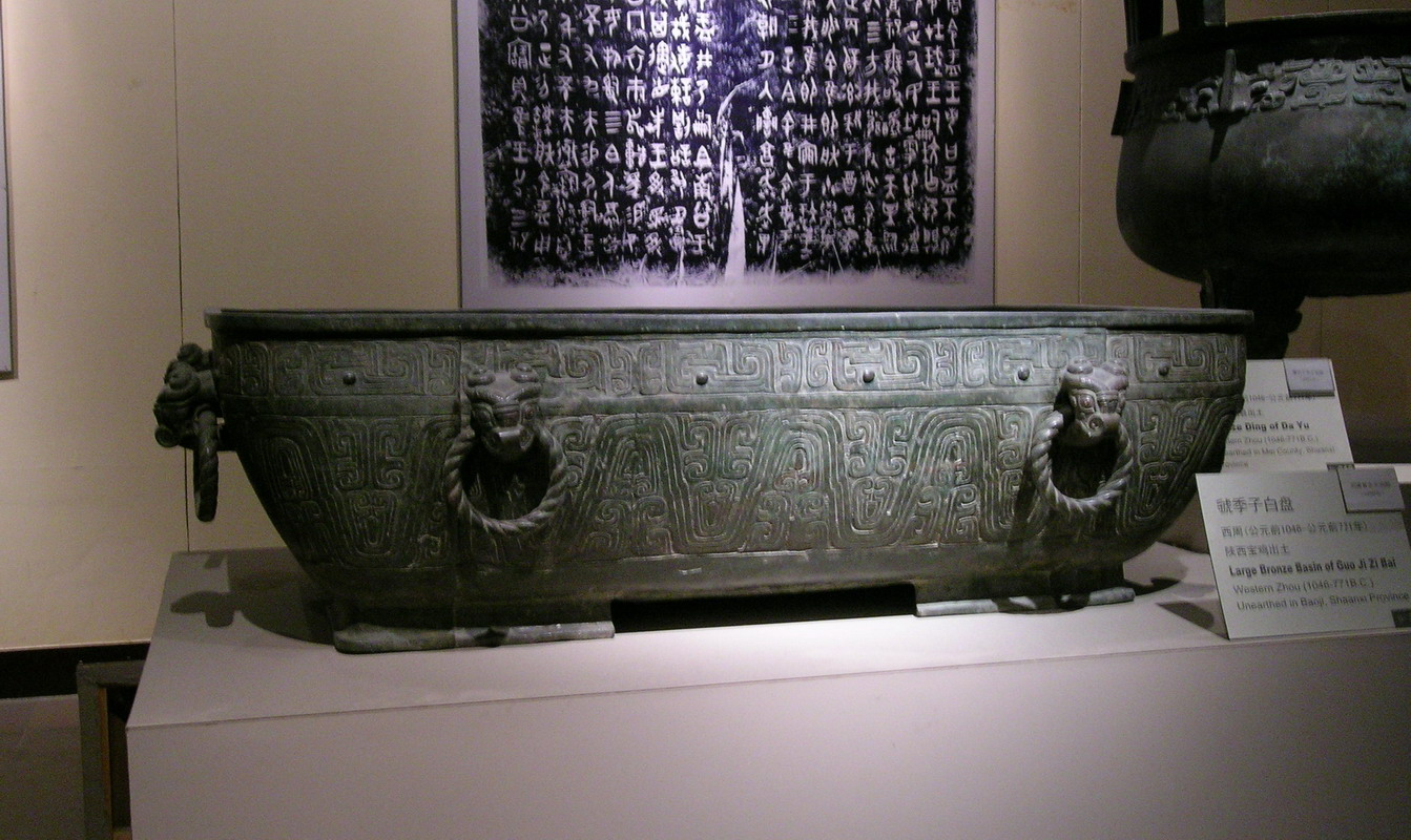 虢季子白盘，西周宣王时期（公元前827～前782年），传陕西宝鸡出土，中国国家博物馆藏